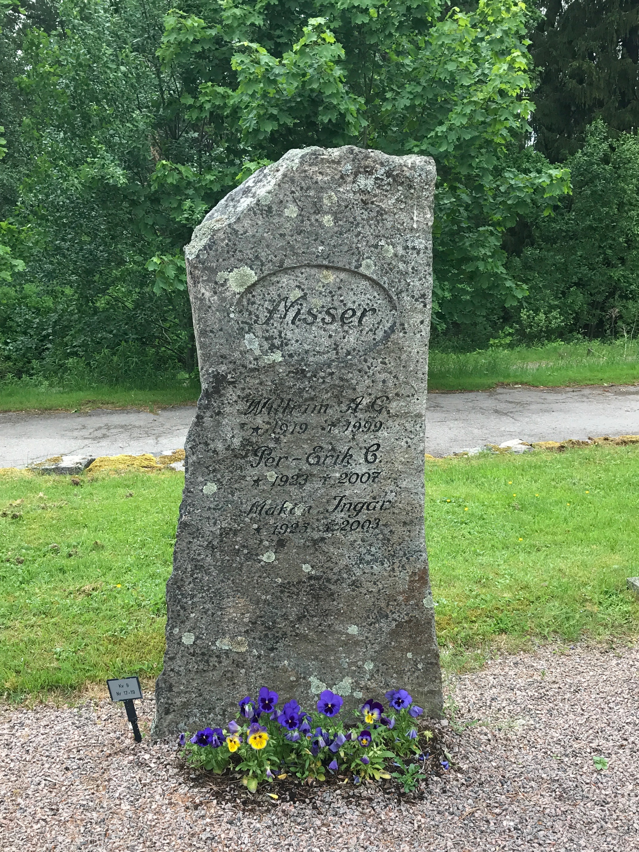 Peter Nisser och Per-Erik Nissers grav på Alsters kyrkogård, Värmland.